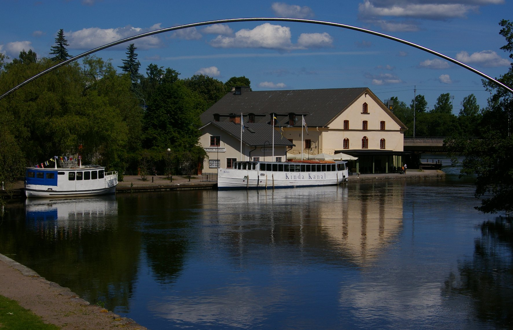 Drömmarnas båge, ett konstverk av tre i serien "Drömmarnas plats" vid Stångån nära centrala Linköping. Av konstnären Maja Spasova.